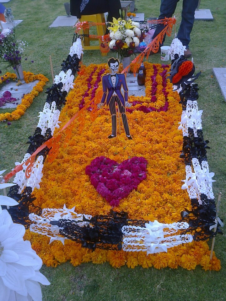 La gente suele adornar las tumbas de sus seres queridos